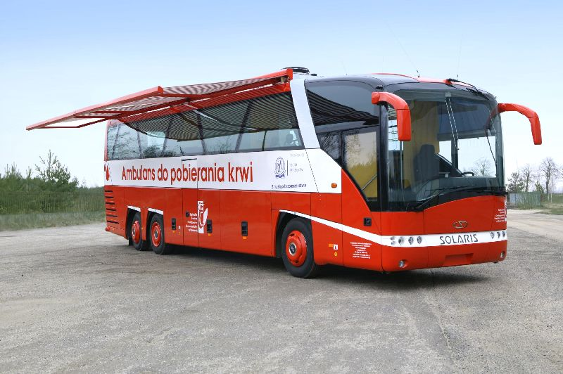 Ambulans